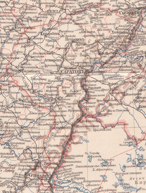 Карта Саратовской губернии 1911 год